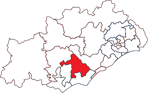 Situation du canton dans le département de l'Hérault